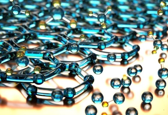 نانو مواد کاربردهای بسیار گسترده دارند